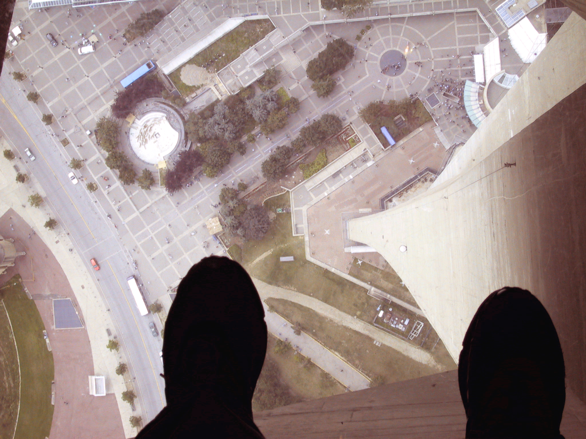 Siicht duerch de gliesene Buedem um CN-Tuerm zu Toronto. Source:Eege Foto vum , dem Pascal Reusch